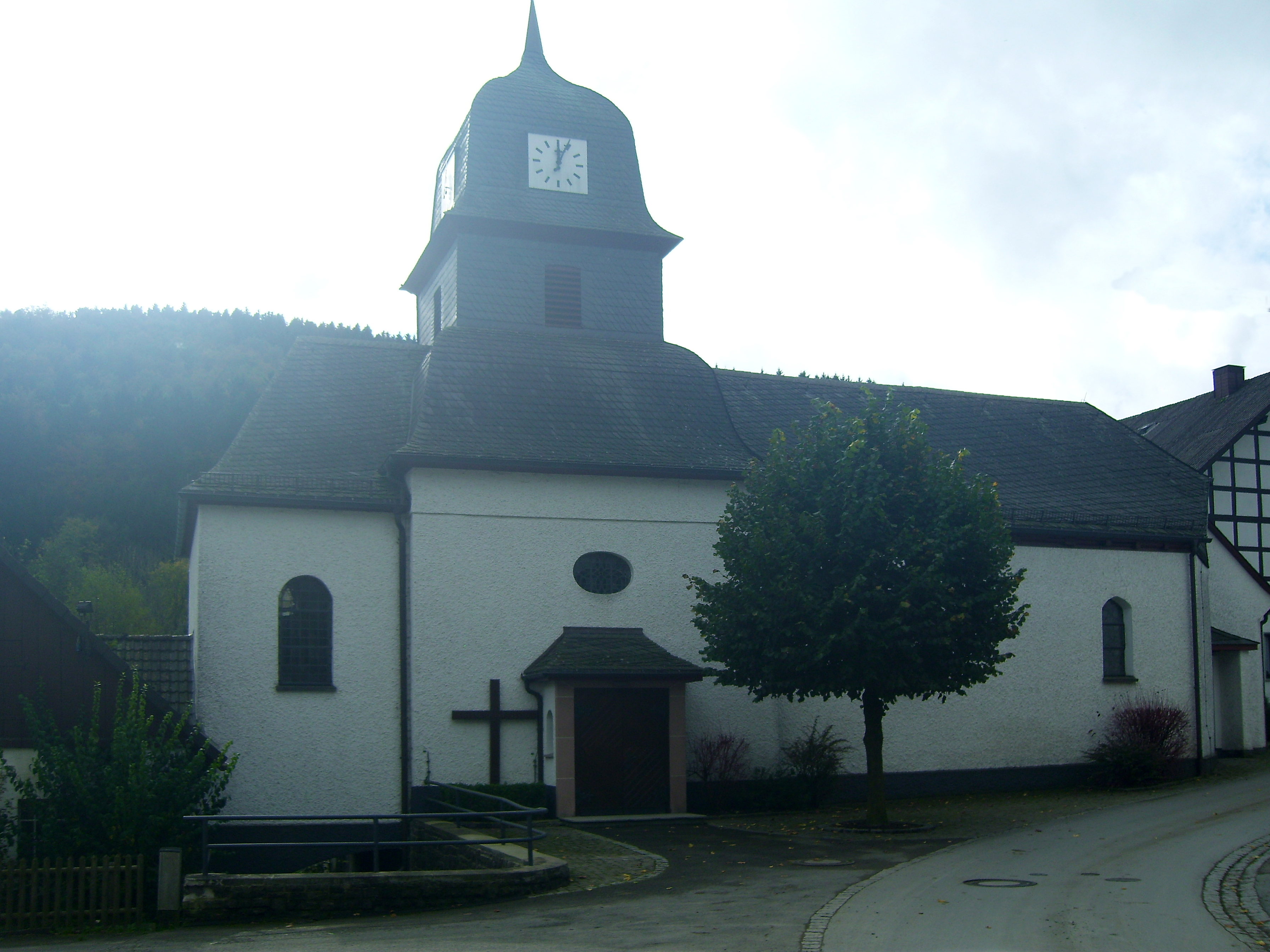 St. Antonius, Außenansicht, Medebach-Titmarighausen This image shows a heritage building in Germany, located in the North Rhine-Westphalian city Medebach (no. 20).